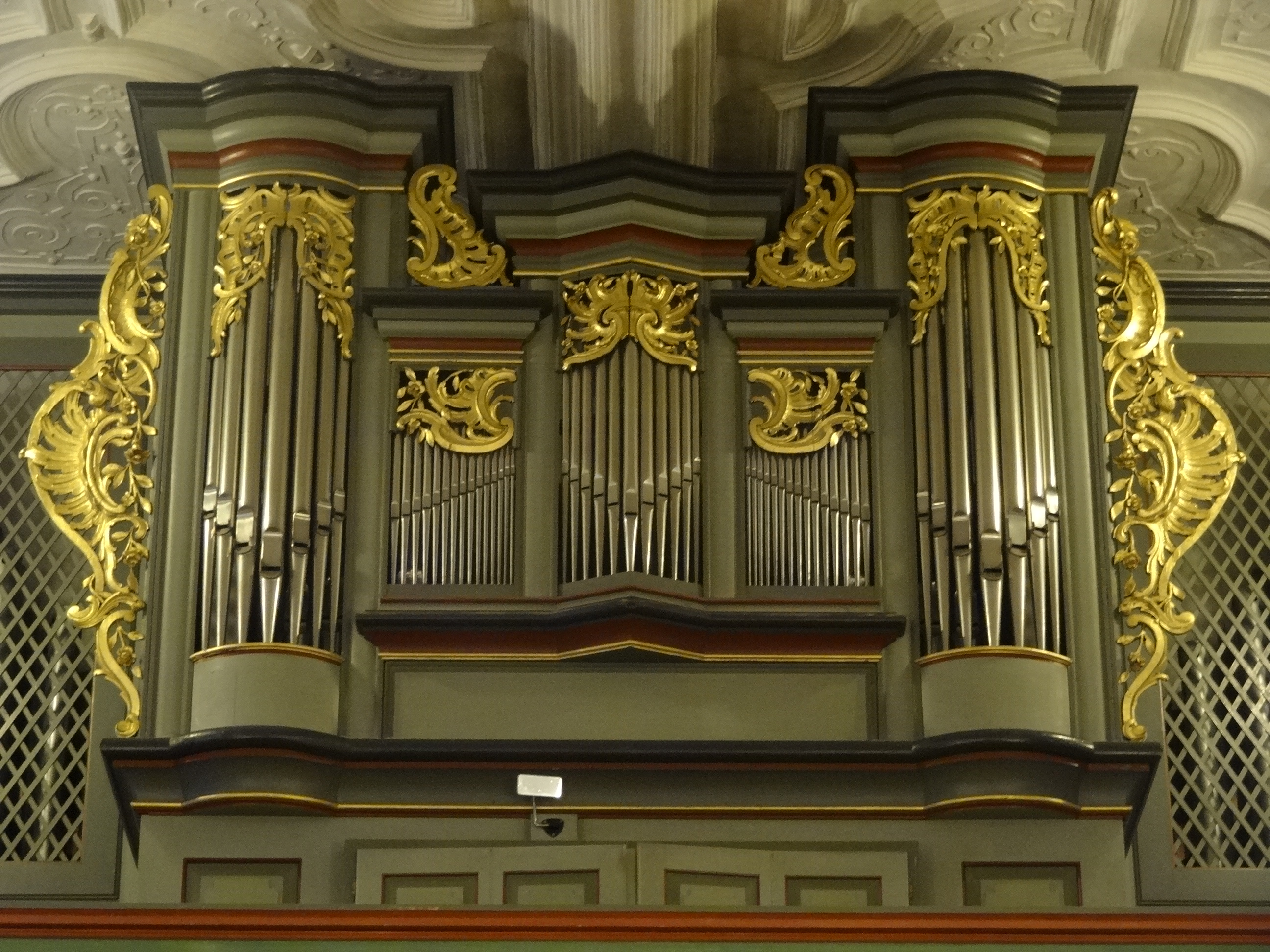 Stadtkirche zum Heiligen Geist (Nidda)